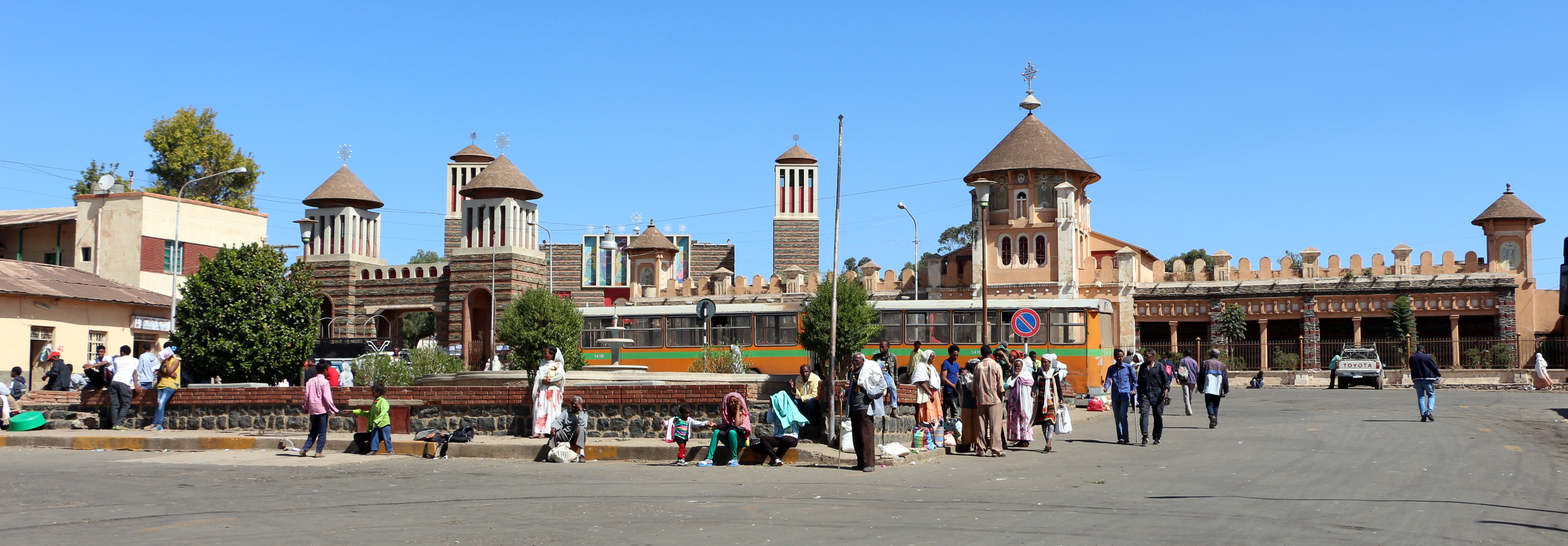 Asmara, cattedrale ortodossa 01.JPG